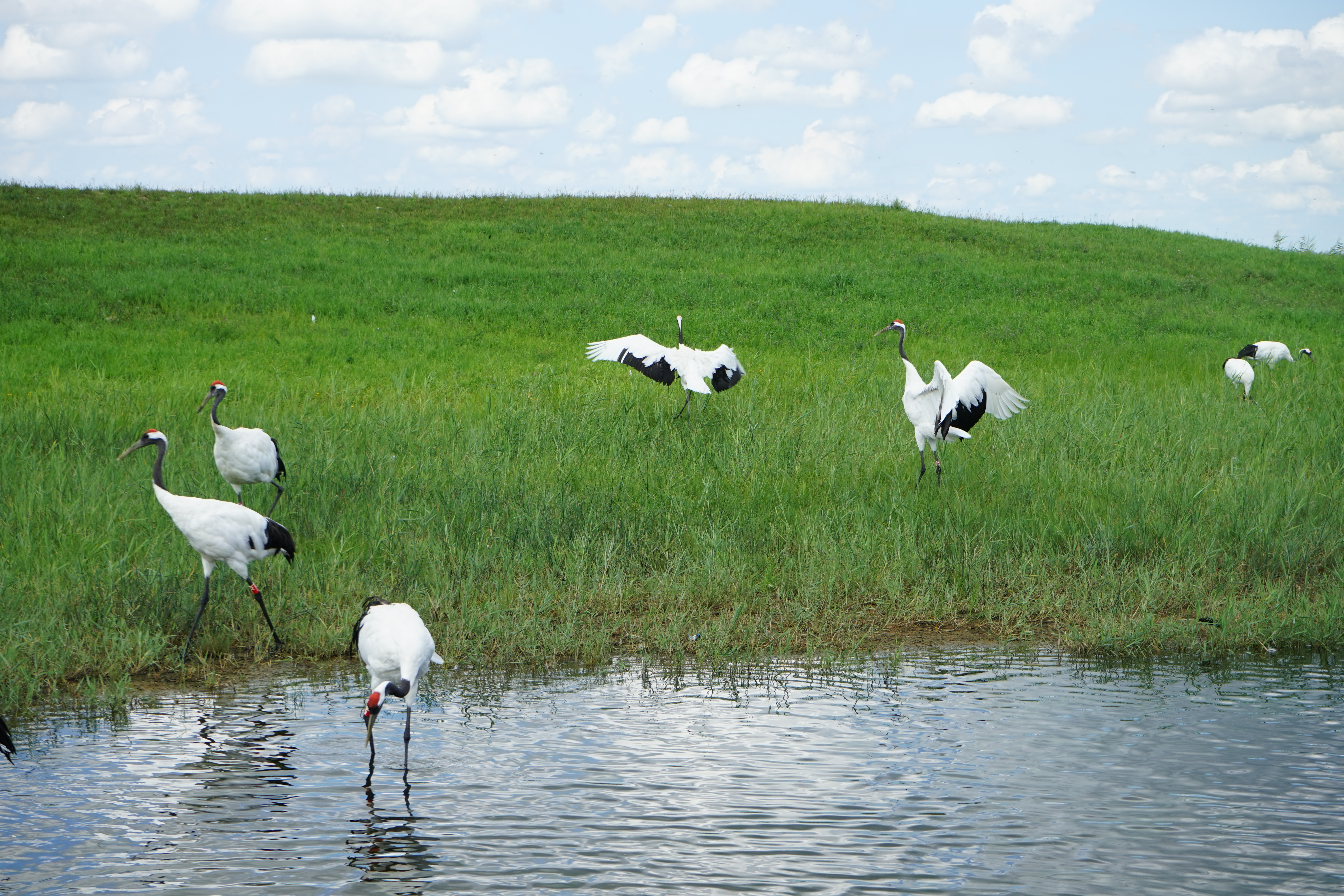 中文（中国大陆）: 丹顶鹤，放飞地，扎龙